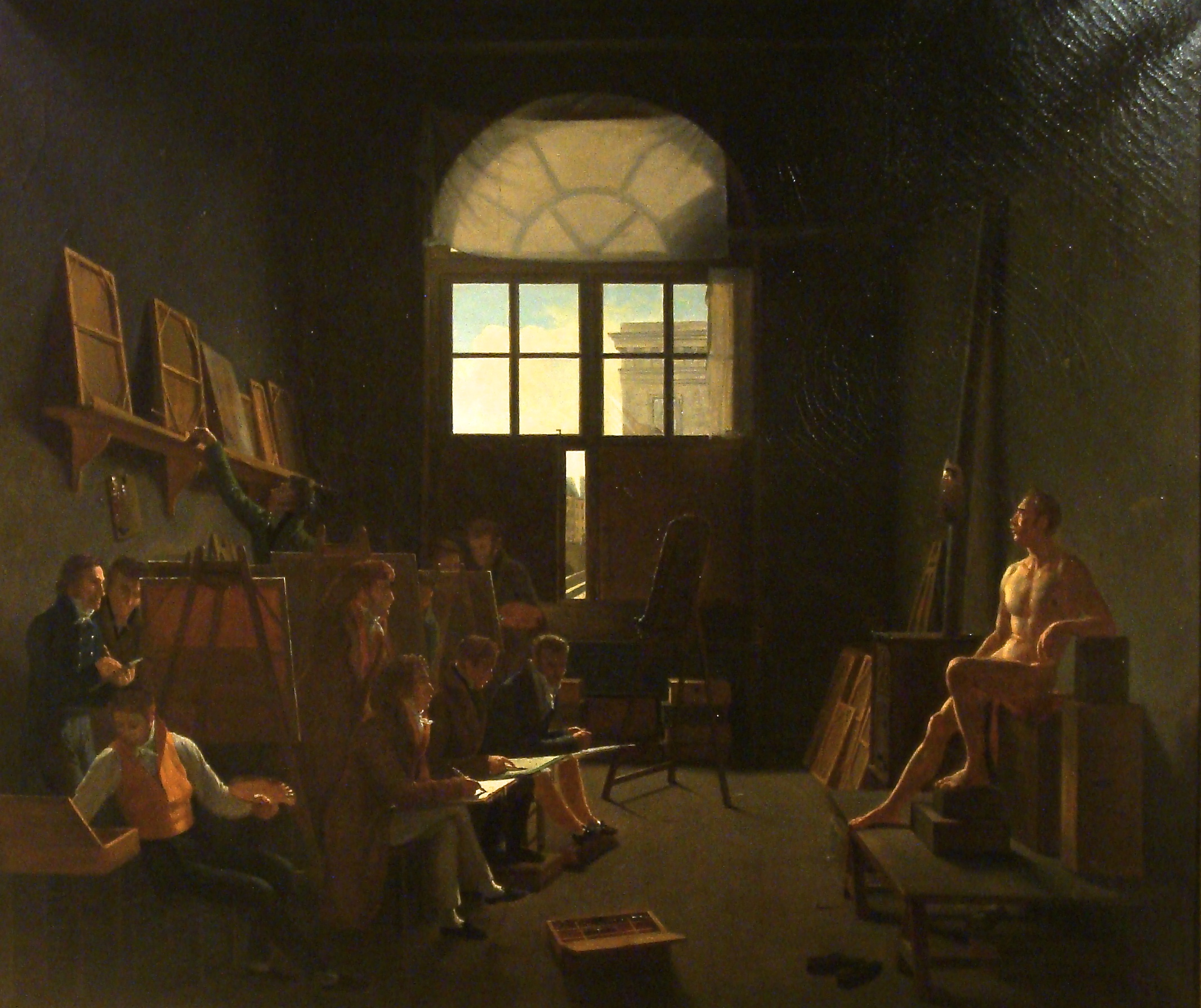 L'atelier de David par Léon-Matthieu Cochereau (1793-1817)